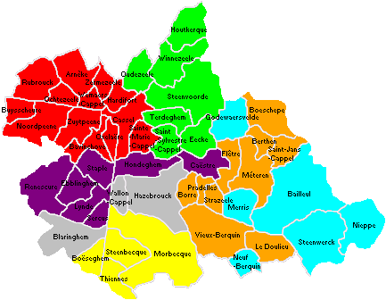 Composition de la CCFI